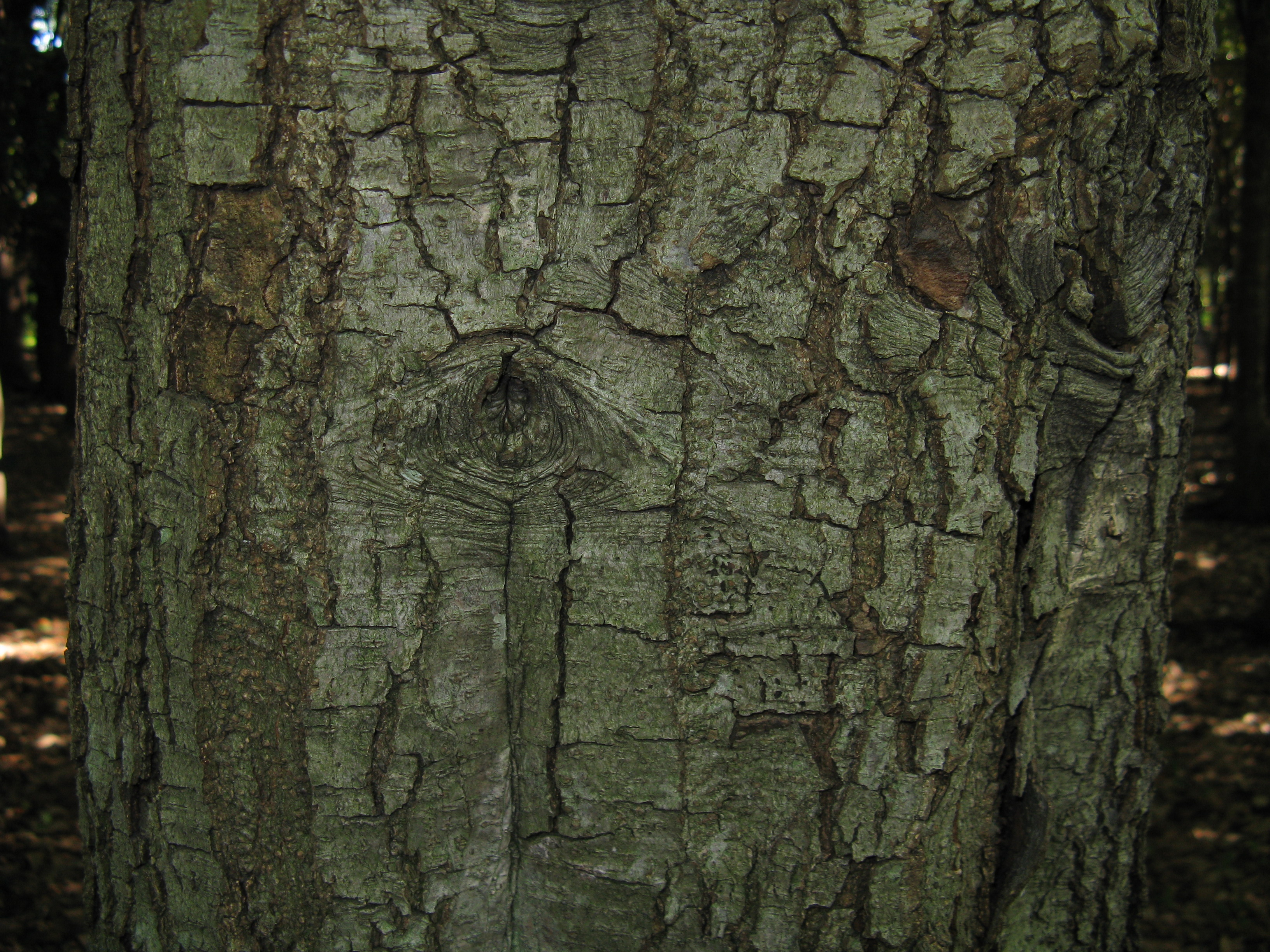 Scientific name Quercus gilva